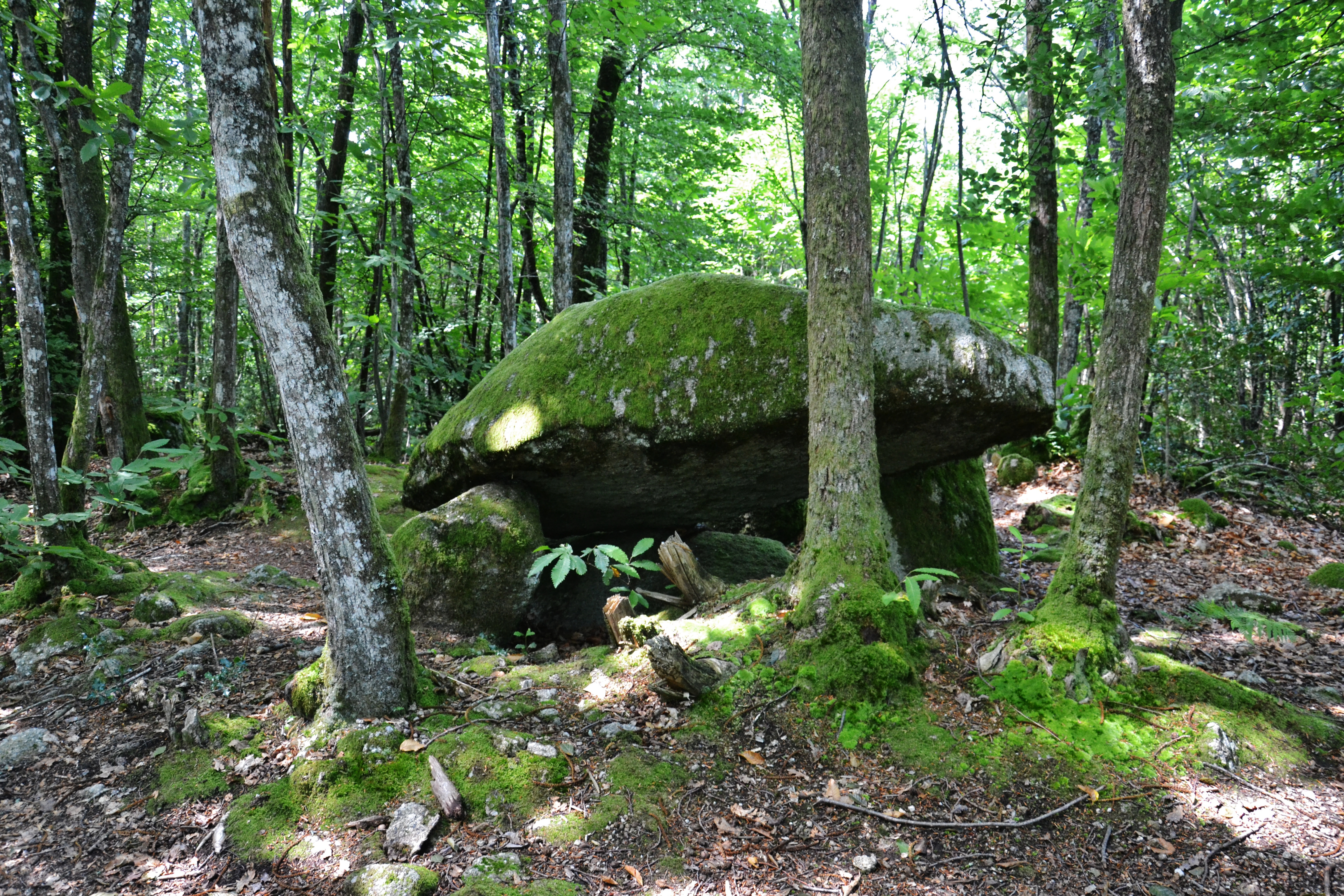 Dolmen du bois de la Lieue, près d'Ambazac (Haute-Vienne, France)